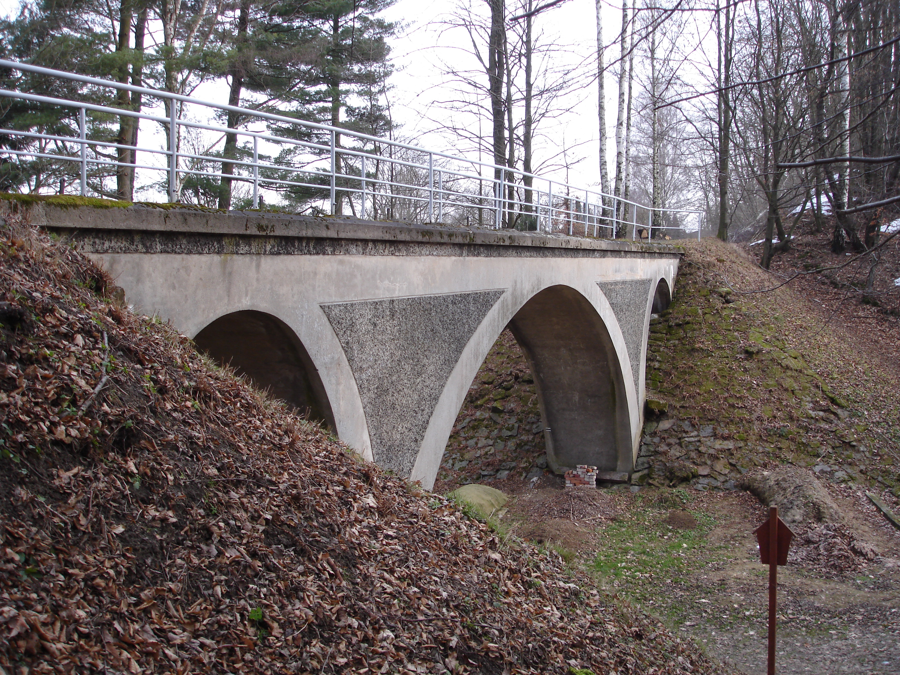 Brücke der ehemaligen Schwarzbachbahn bei Hohnstein